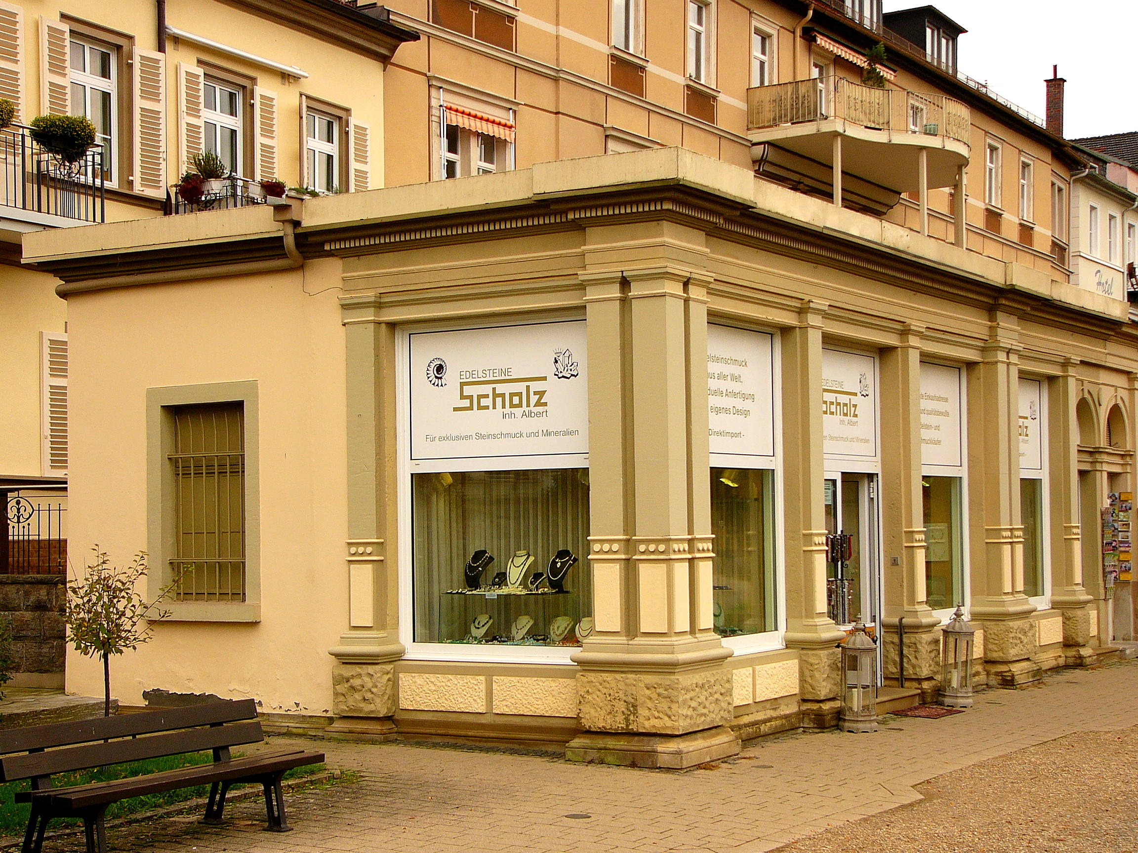 Ladenzeile, bzw. Bazargebäude, eingeschossiger Flachdachbau, mit Pilastergliederung und Rusikasockel, in Formen der Neorenaissance, um 1900. This is a photograph of an architectural monument.